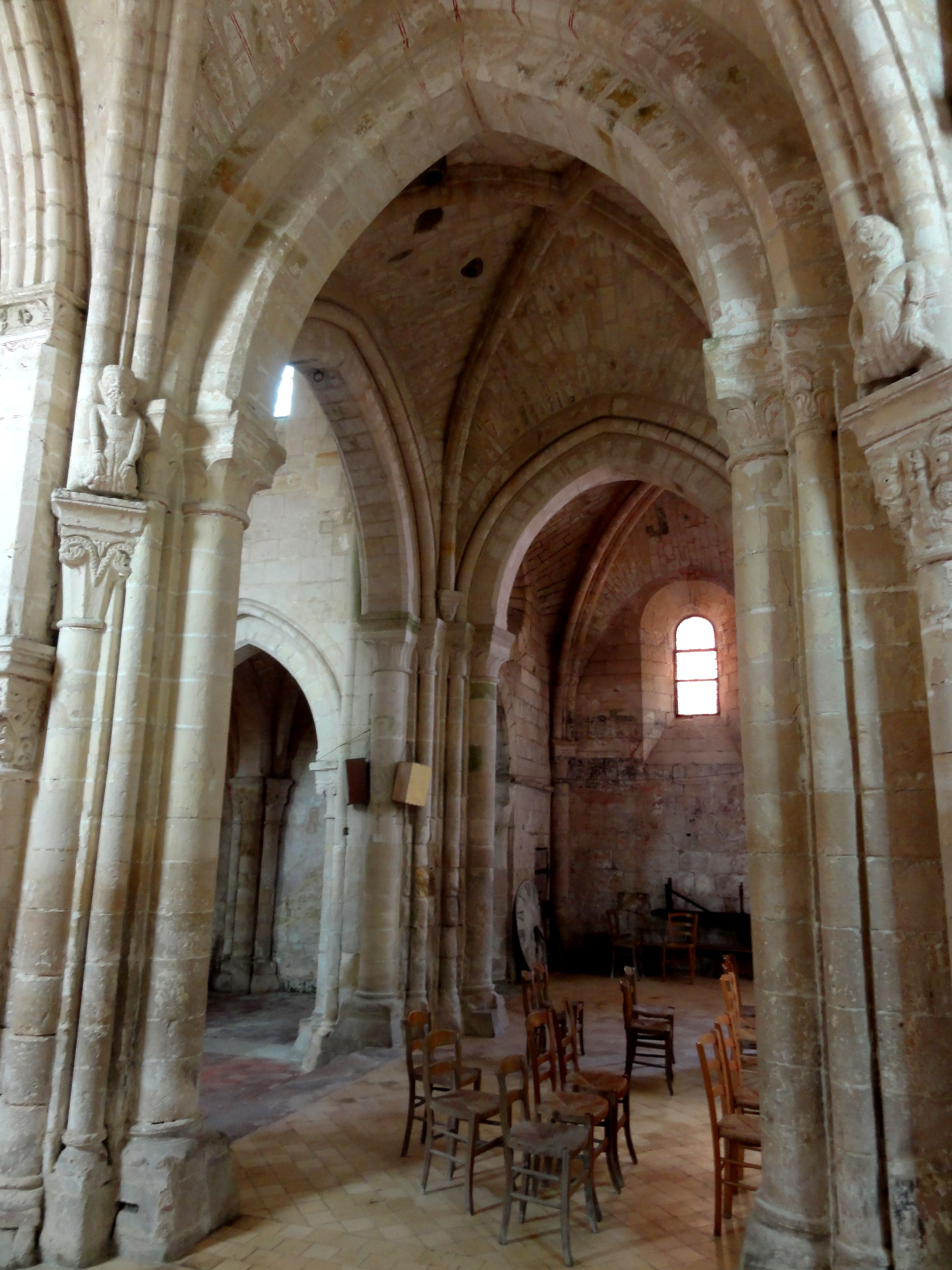 Transept, vue sud-nord.